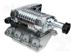 2008 Mustang supercharger